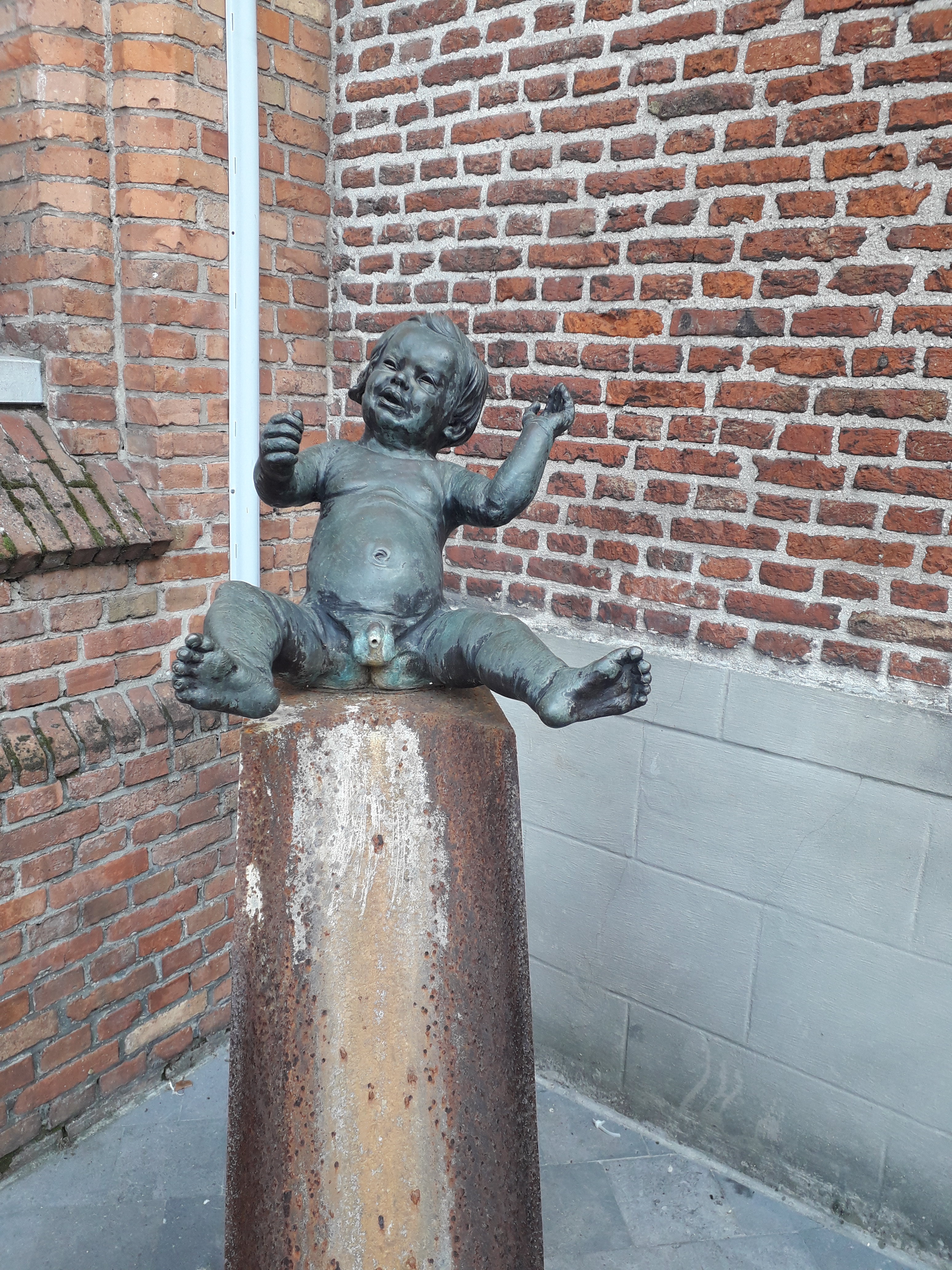 Bronzen beeld van Rietje Koane aan de Sint-Barbarakerk in Maldegem